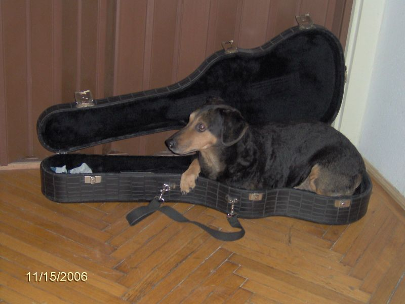 Mazsola, a hangszerészkutya